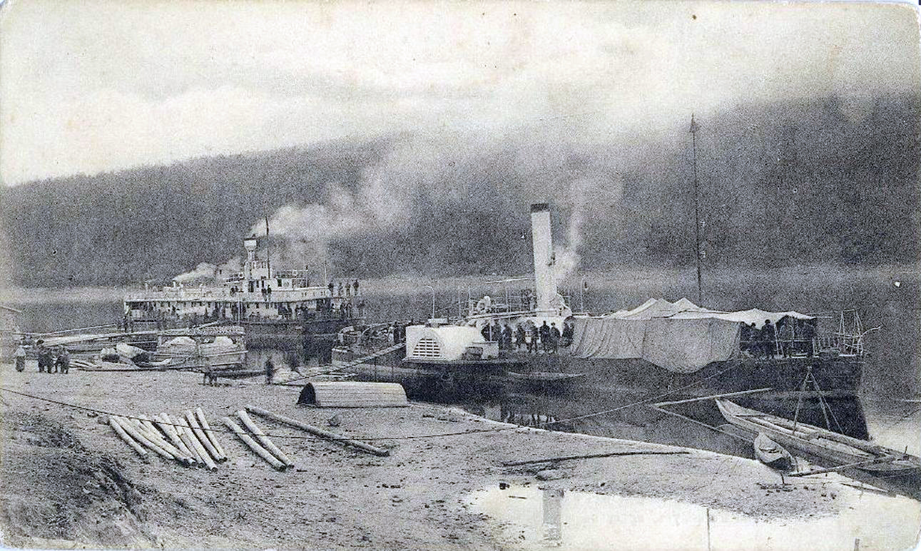 Село Усть-Кут, вид на пристань (до 1917)